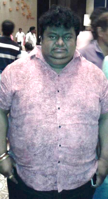 చక్రి